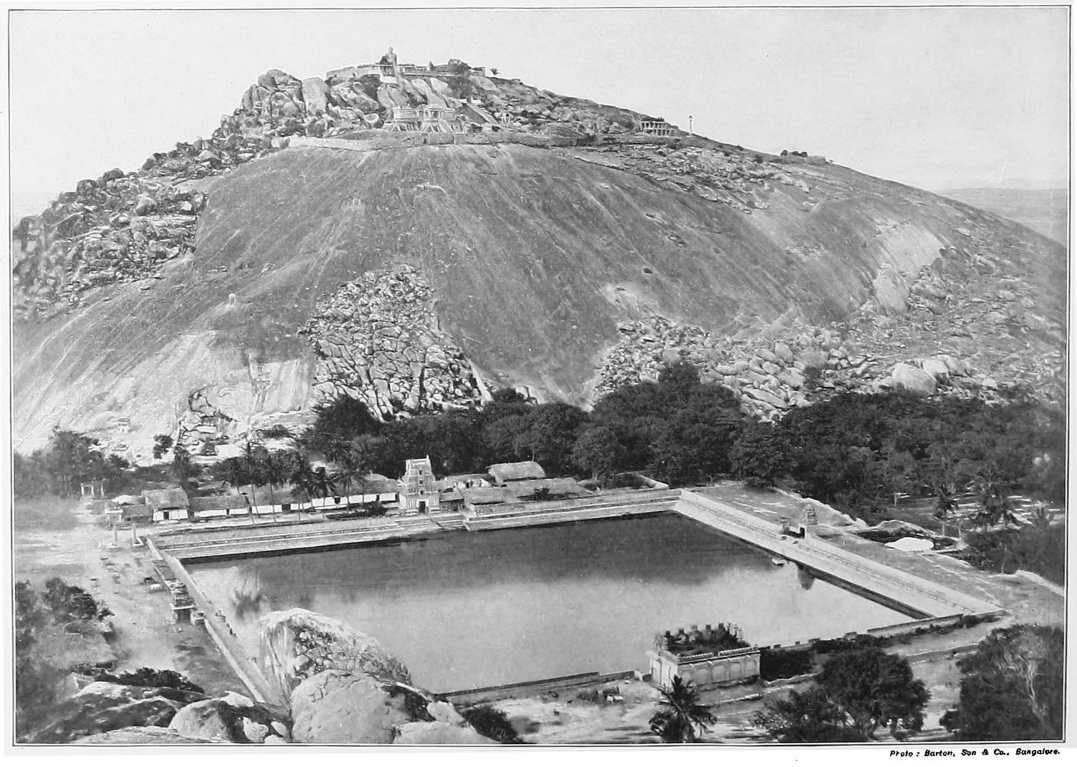 Shravanabelagola, Karnataka